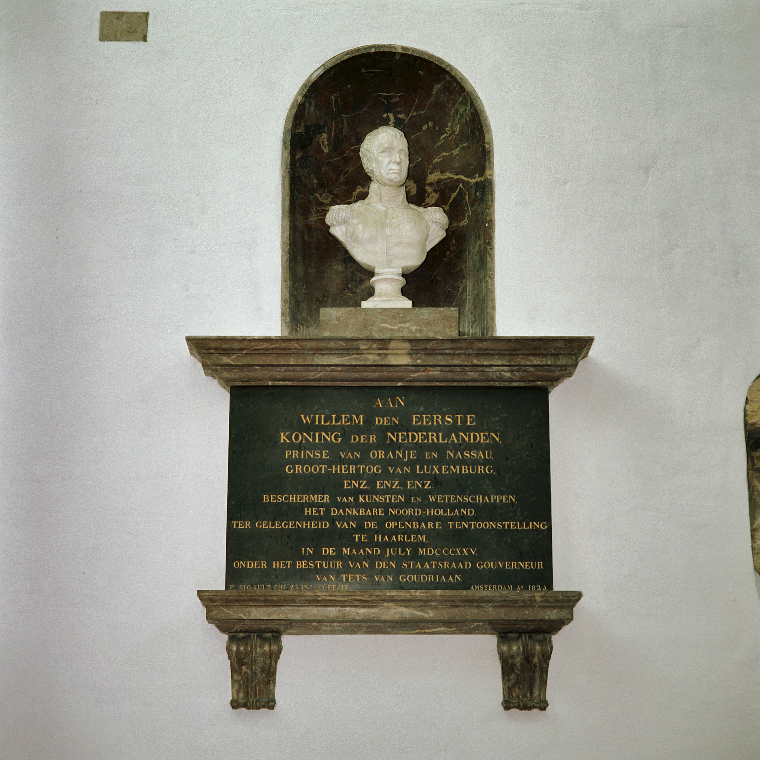 Sint Bavokerk: Interieur, borstbeeld van Willem I (opmerking: Gebruikt voor boek Monumenten voor Oranje en Nassau, pag. 125)